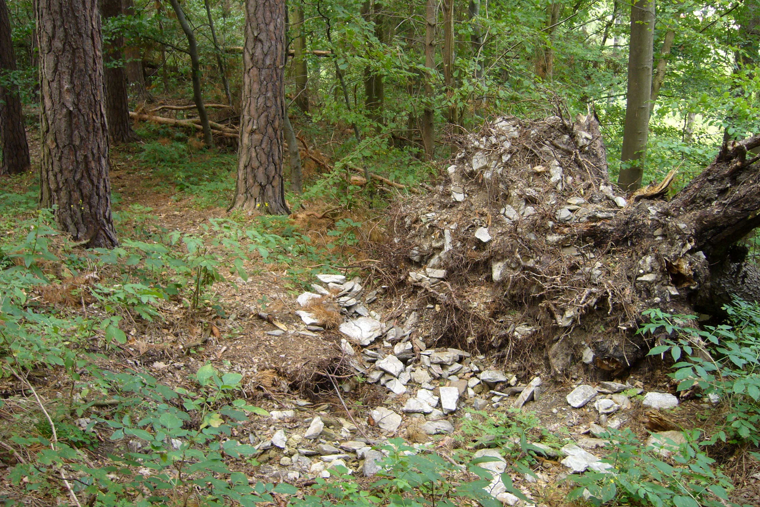 Vývratem odkrytá suť ve východním nároží hradního jádra Ostrolovský Újezd.